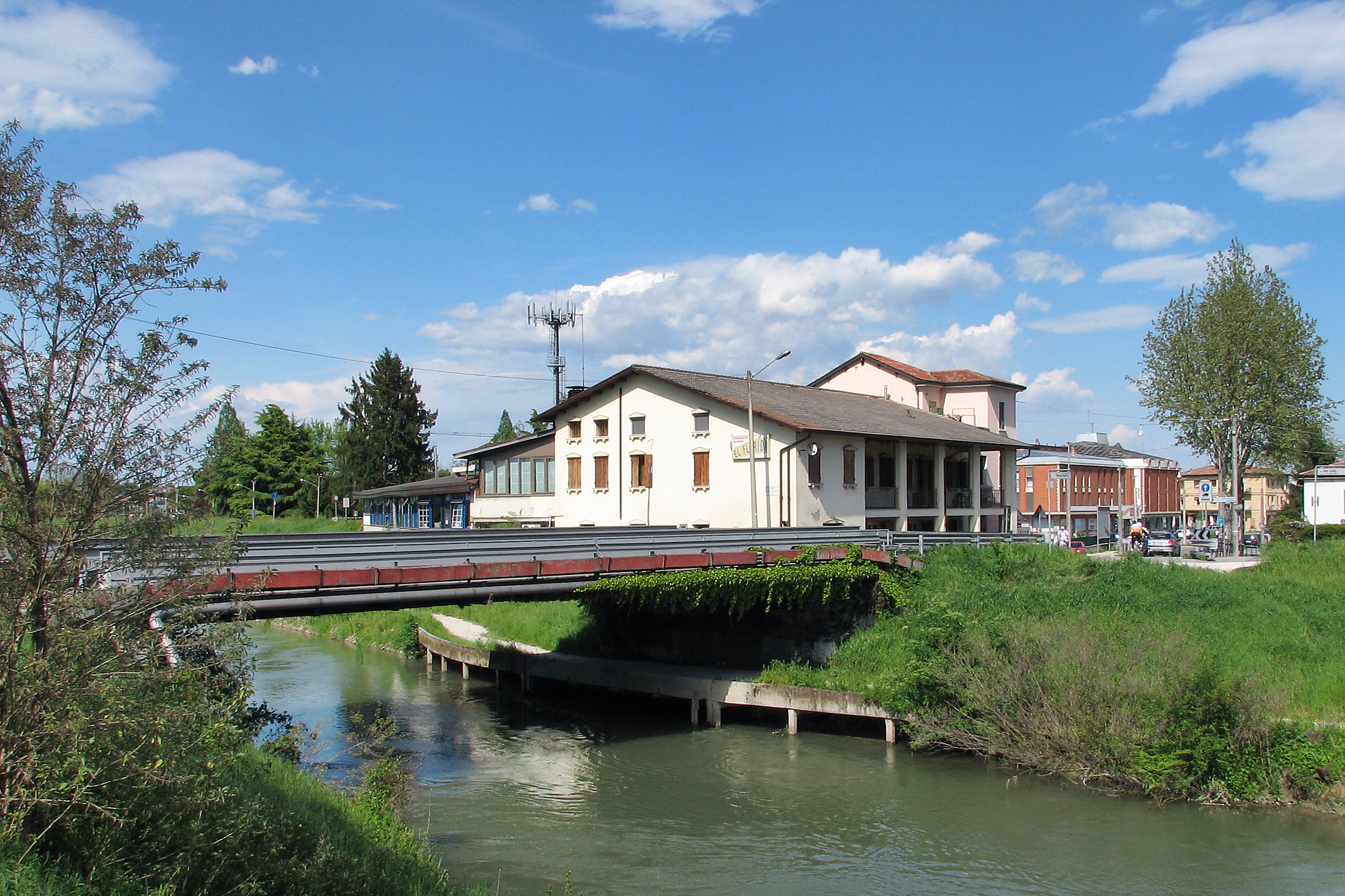 Il canale Brentella al ponte di Brentelle di Sotto.